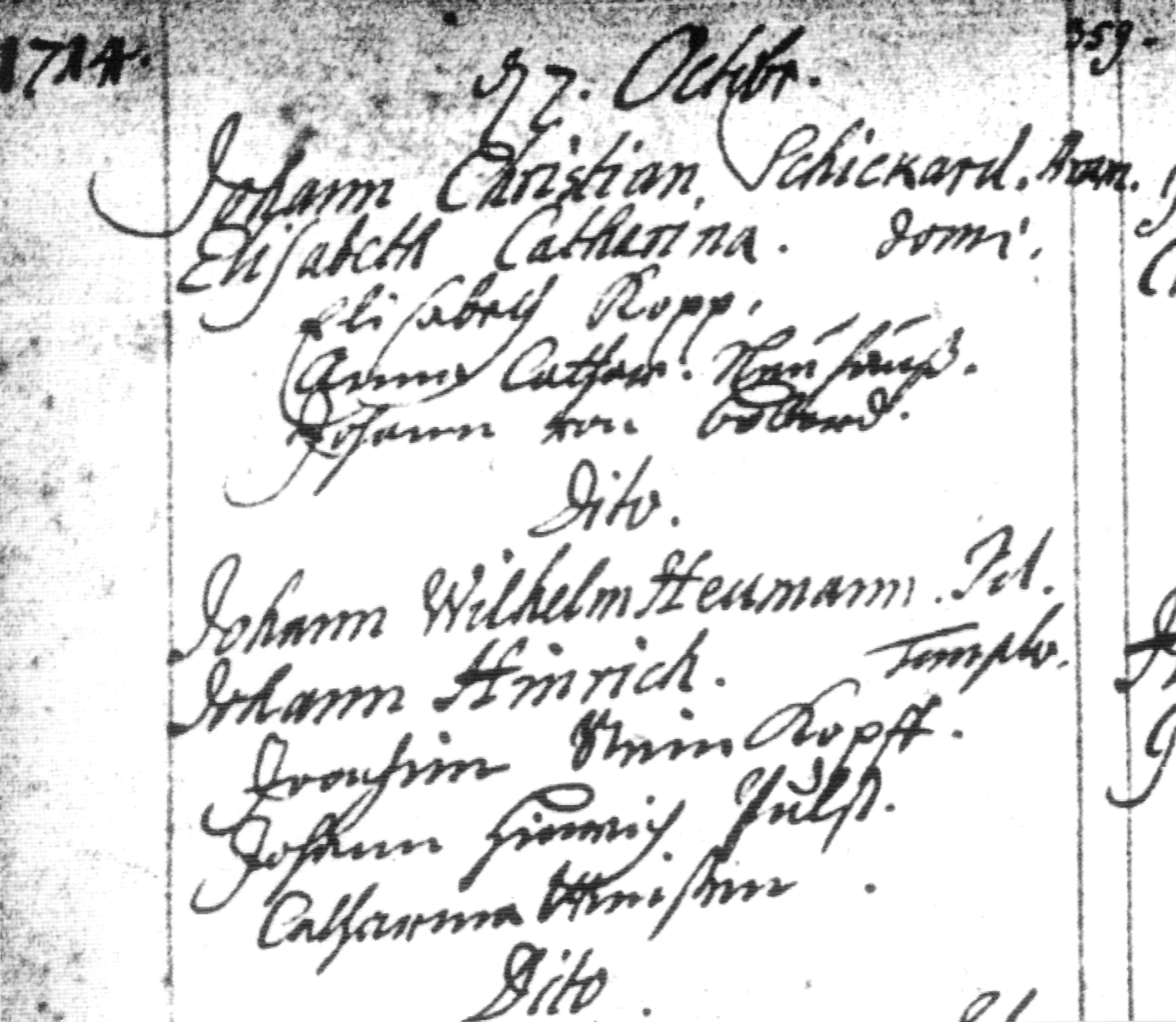 Auszug aus dem Taufbuch der Pfarrgemeinde St. Petri in Hamburg mit dem Eintrag Elisabeth Catharina Schickhardt, einer Tochter von Johann Christian Schickhardt